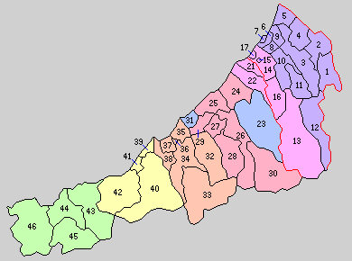 大阪府泉南郡の町村。